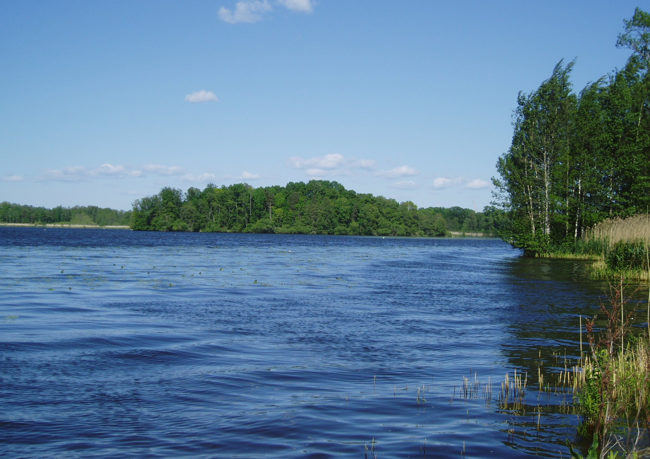 Näsnaren (Östra Vingåkers socken), sjö norr om Katrineholm